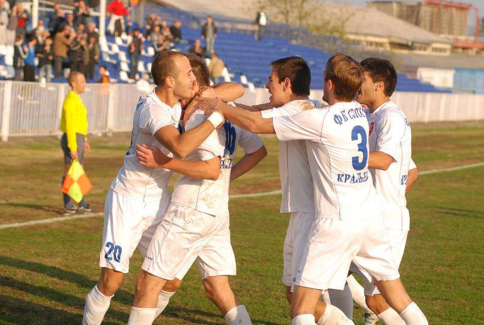 Фудбалери Слоге